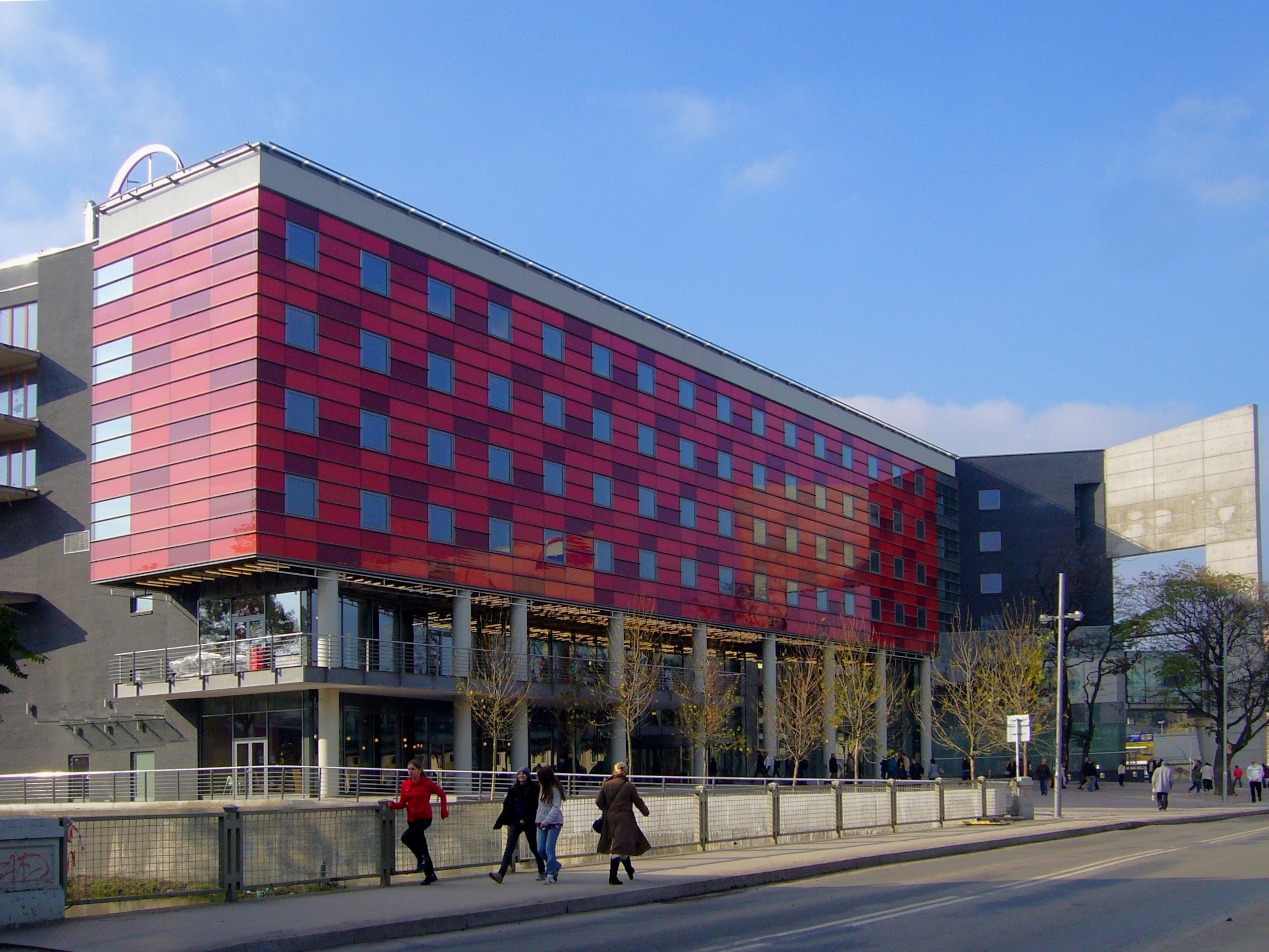 Jižní budova (tzv. Galeria II) obchodního centra Galeria Sfera v Bílsku-Bělé v říjnu 2009.